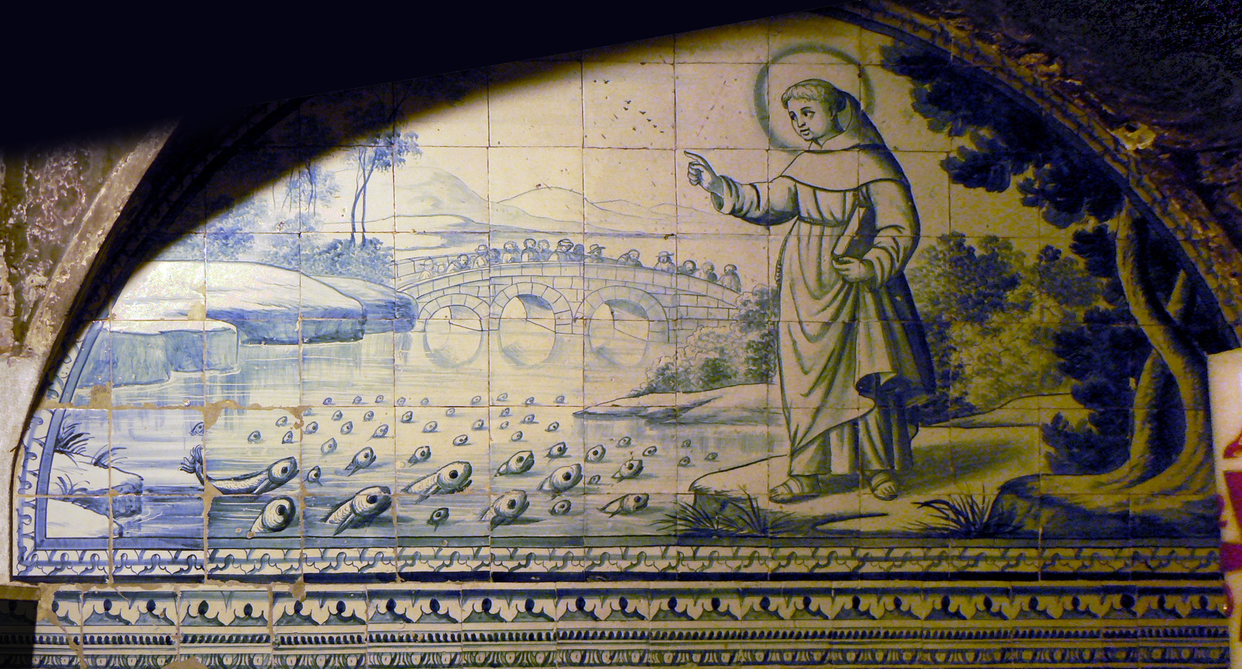 Azulejos représentant Saint Antoine de Padoue, Chapelle baptismale, Cathédrale Sé Patriarcal, Lisbonne, Portugal.